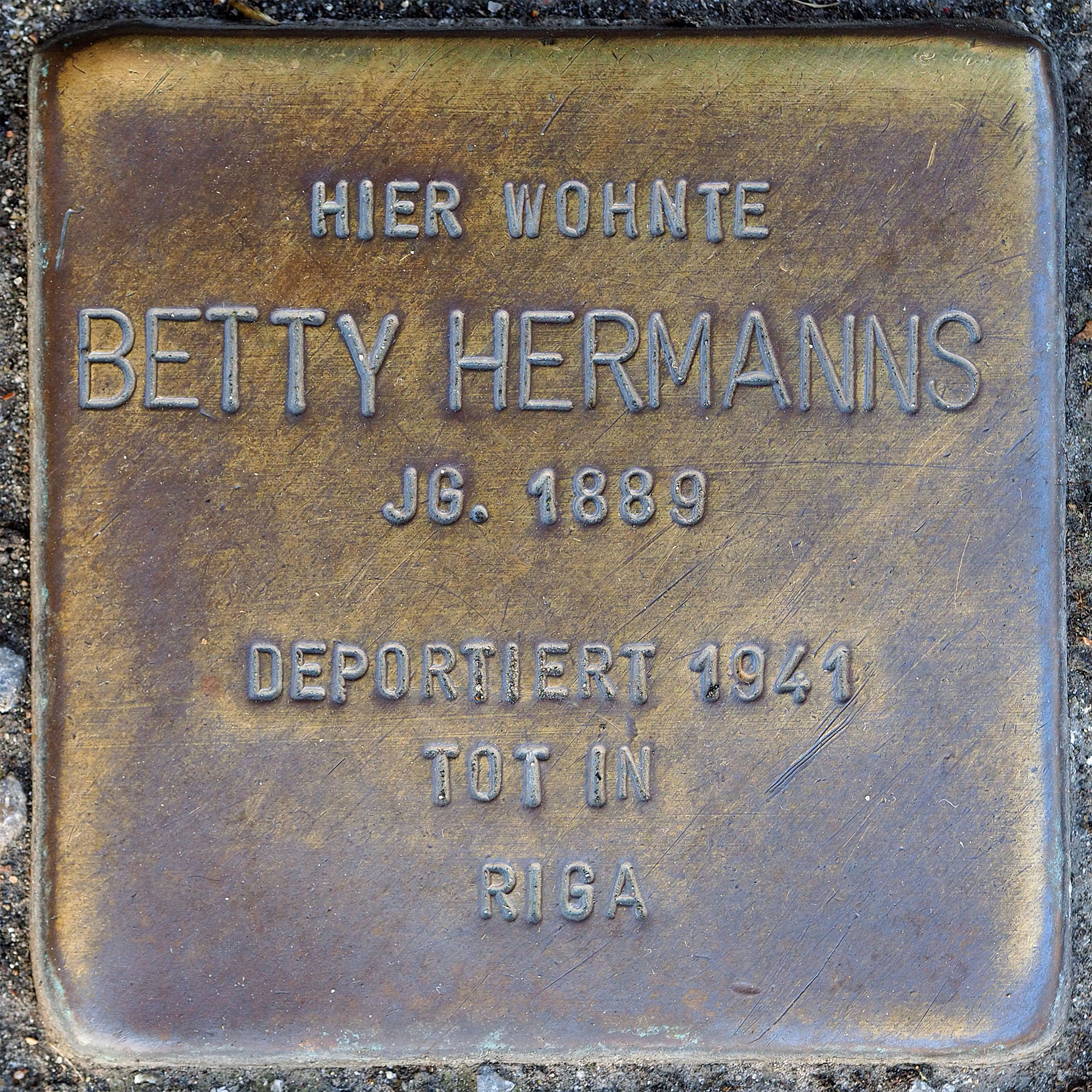 Stolpersteine MG: Hermanns, Betty